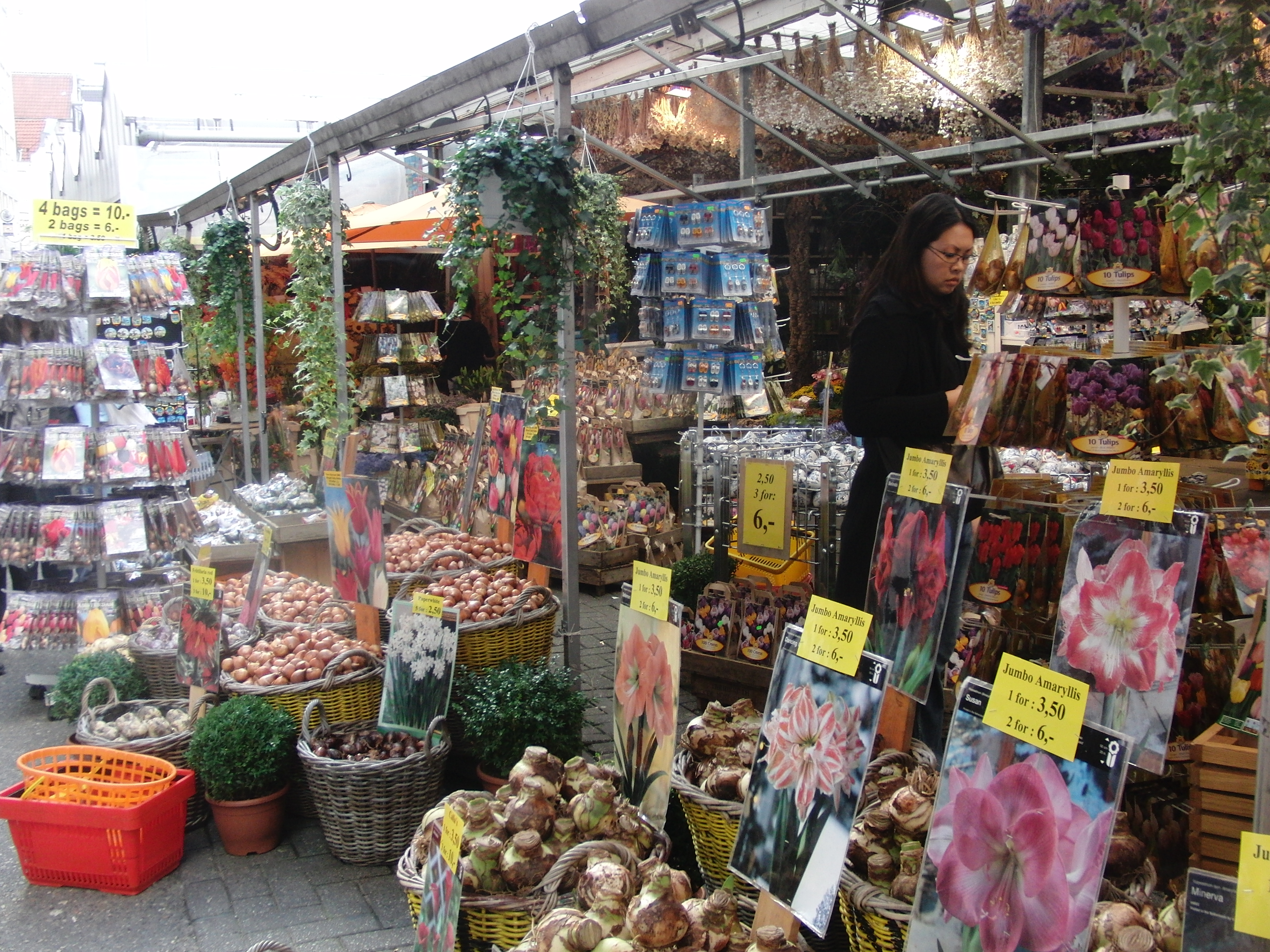 Bulbs sale in shop Amsterdam 2009